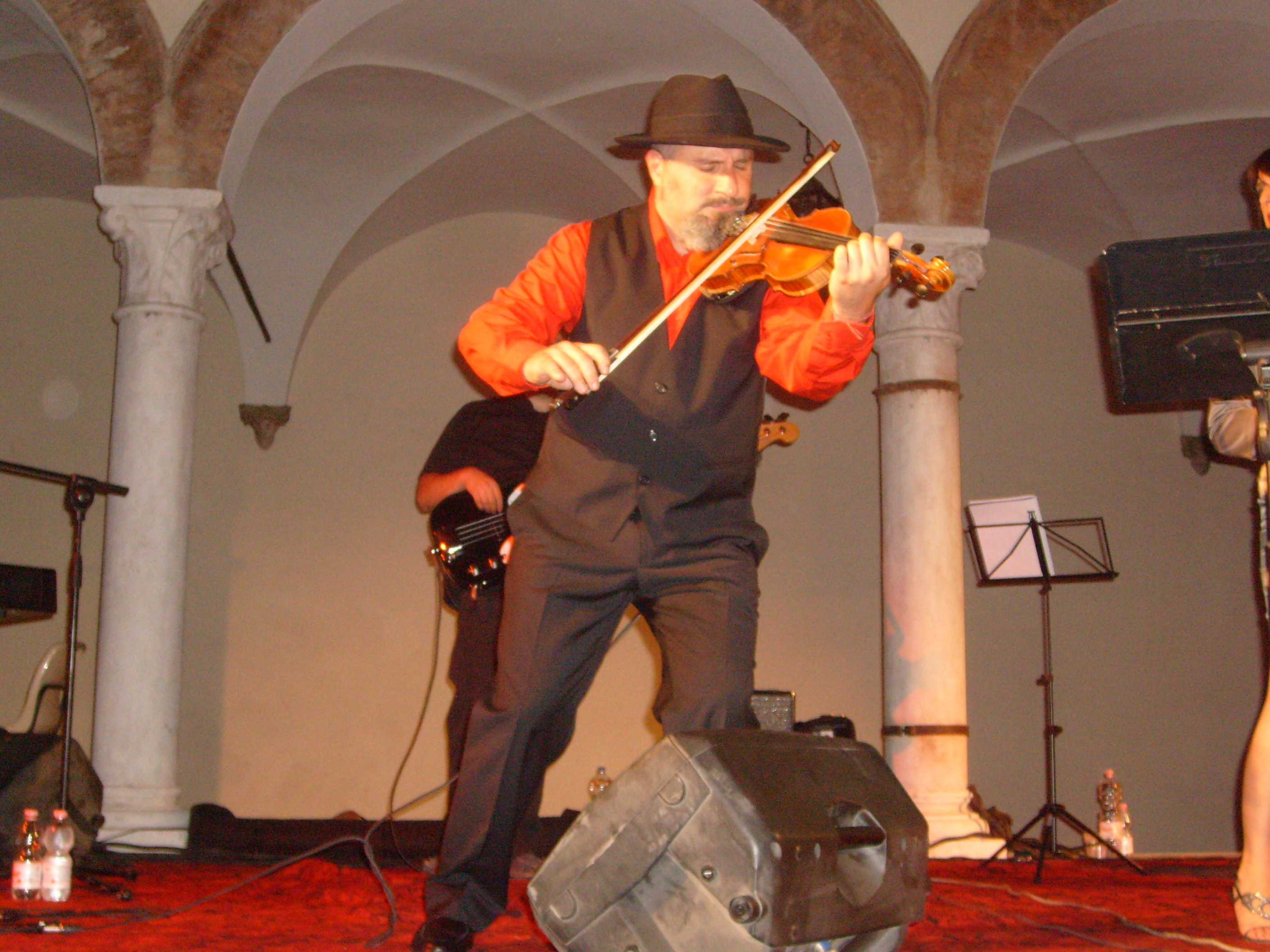 Michele Gazich, durante il concerto tenuto a Brescia il 26 giugno 2011, insieme al suo gruppo: La Nave dei Folli